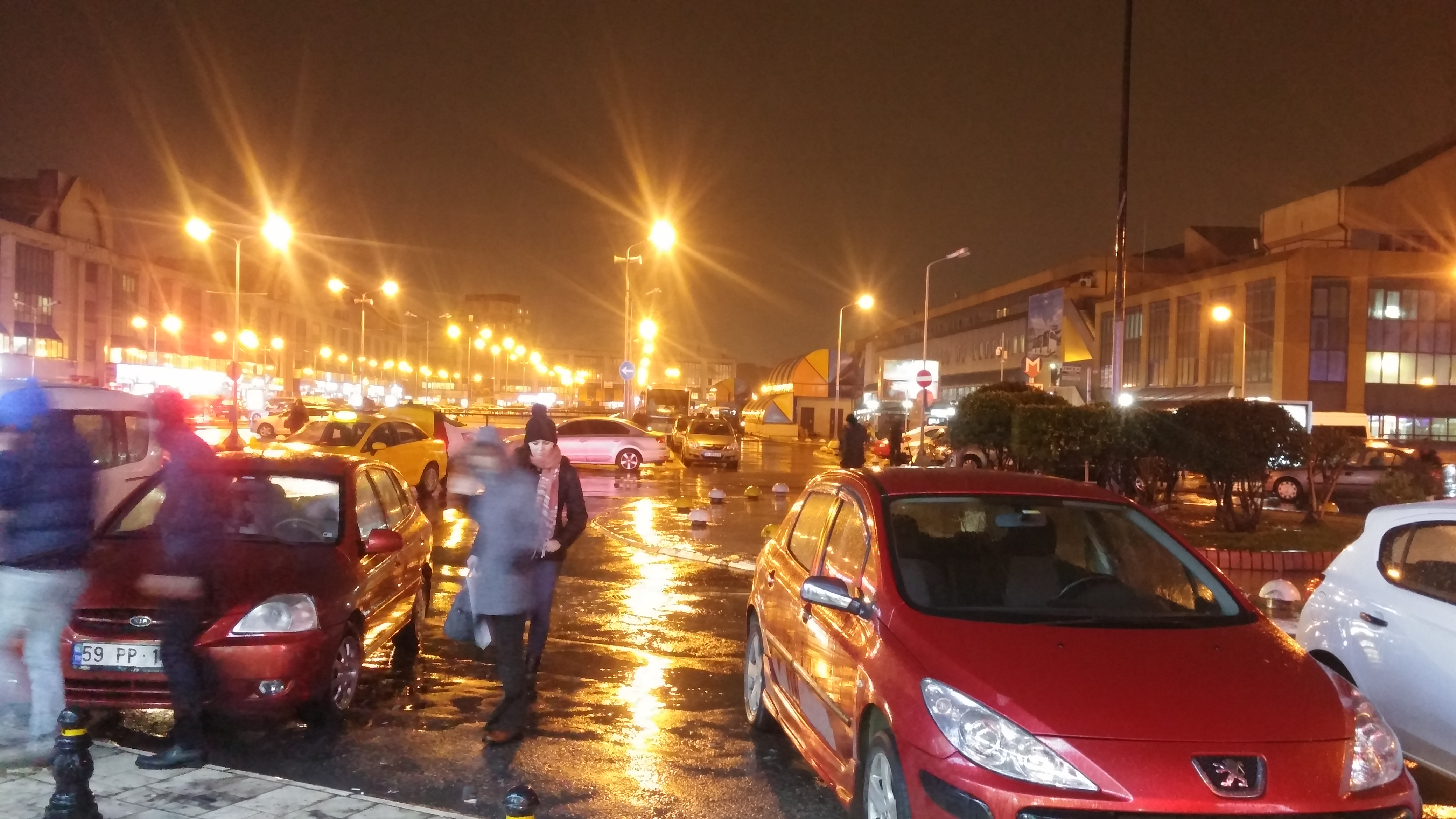 Esenler bus terminus under rain ☔